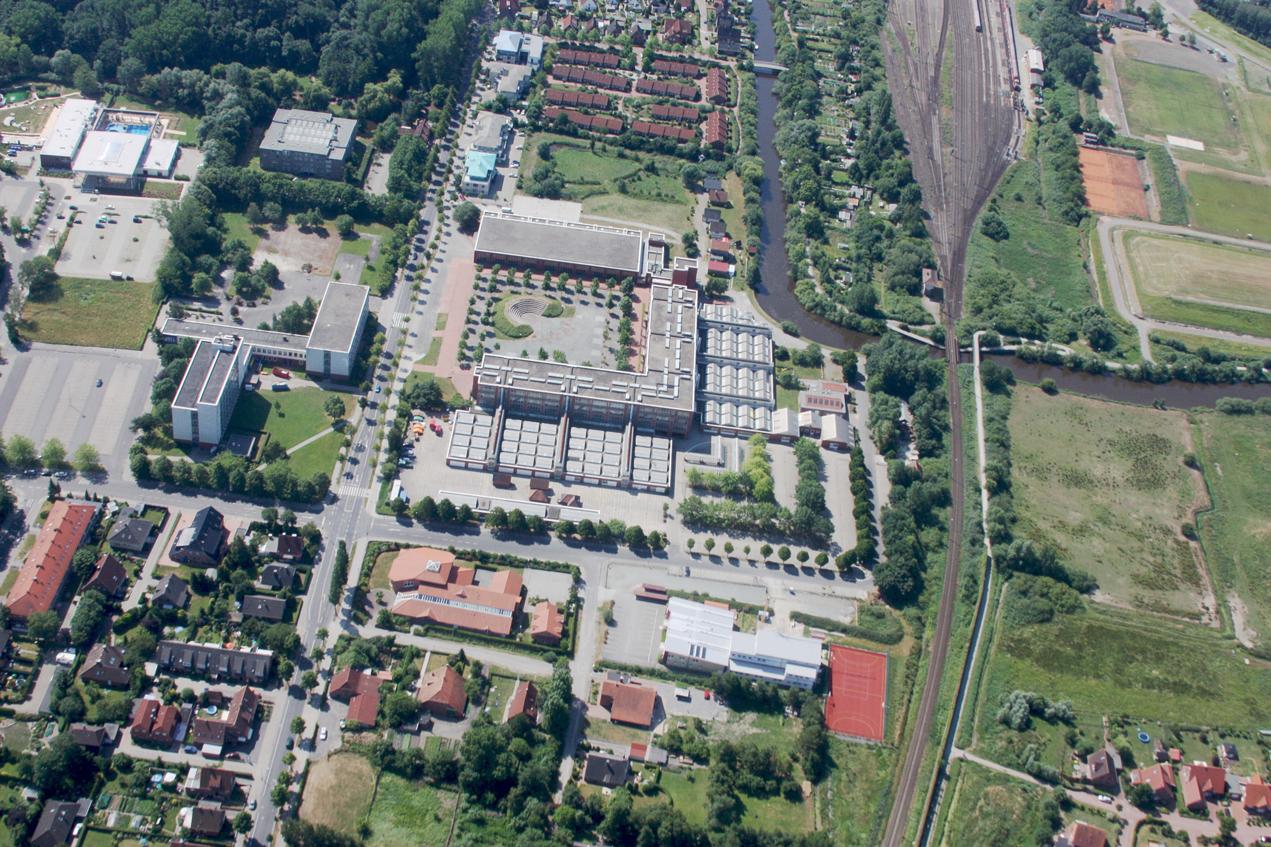 Flug über Emden; Flughöhe 1500 ft; Juli 2010; Originalfoto bearbeitet: Tonwertkorrektur und Bild geschärft mit Hochpassfilter